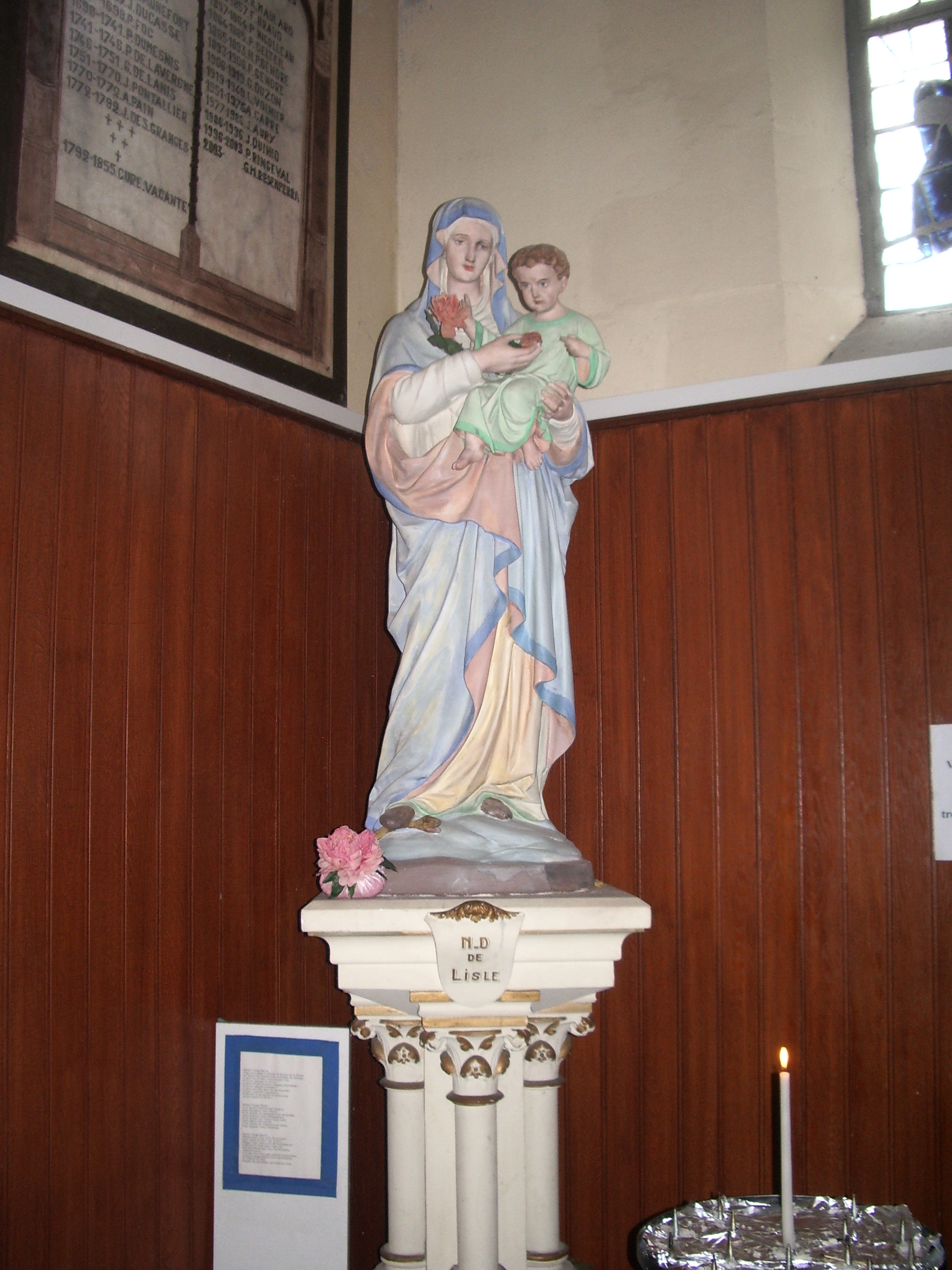 Statue de Notre-Dame de l'Isle - Étaules, Charente-Maritime, France.